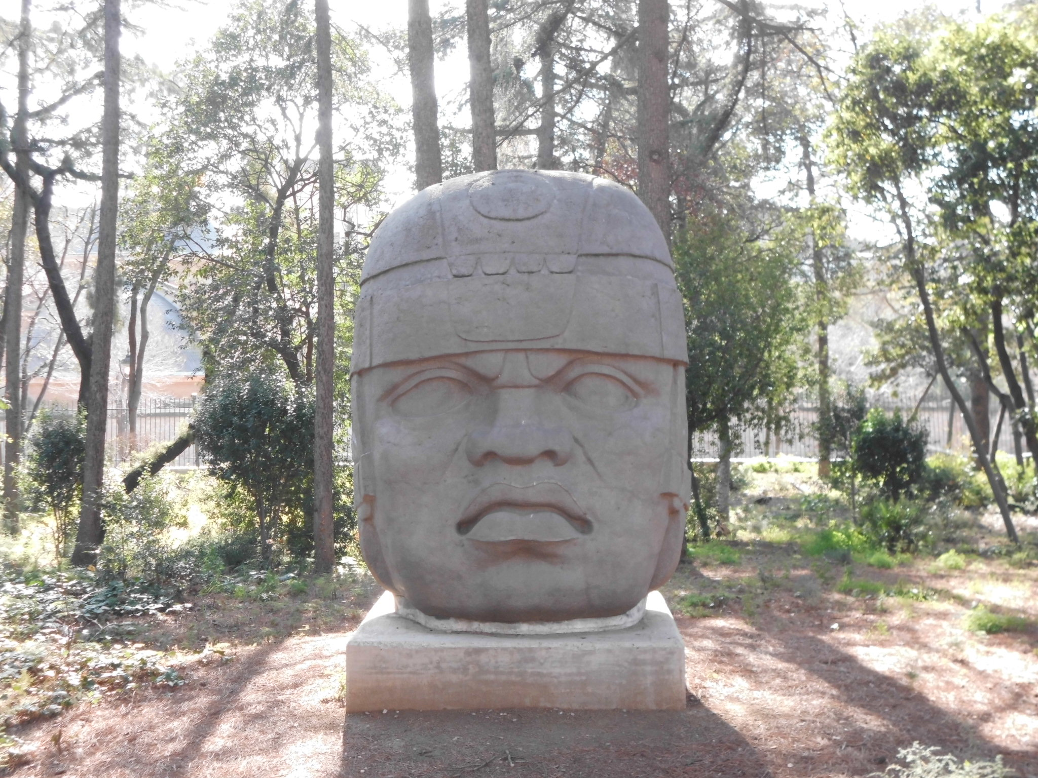 Replica d'un cap Olmeca al jardí de Torre Girona (UPC) de Barcelona